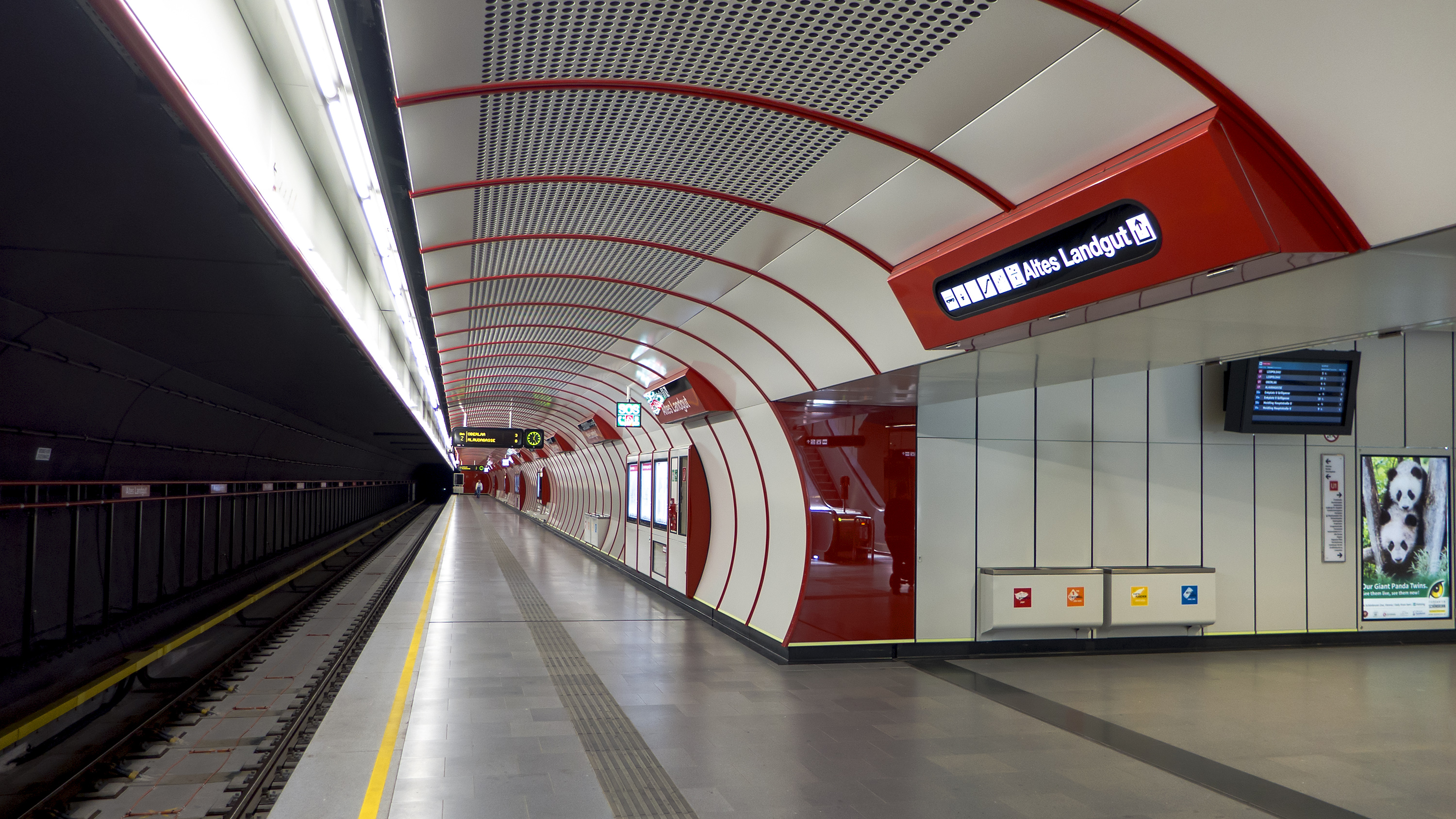 U-Bahn-Station Altes Landgut der Linie U1 in Wien 10, Bahnsteig Fahrtrichtung Oberlaa